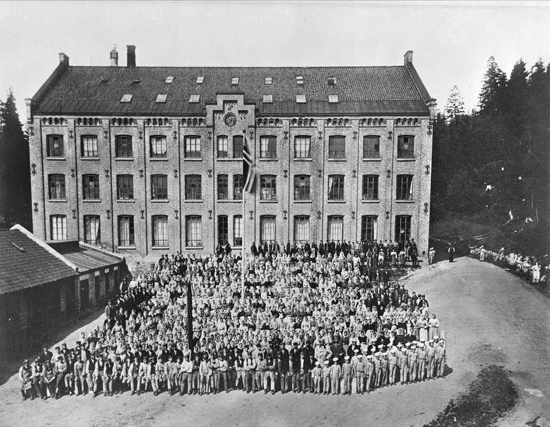 Væveriet med Arbeiderne. Nydalens Compagnie, fabrikkbygning, nedre veveri, arbeidsstokk, kvinner, menn